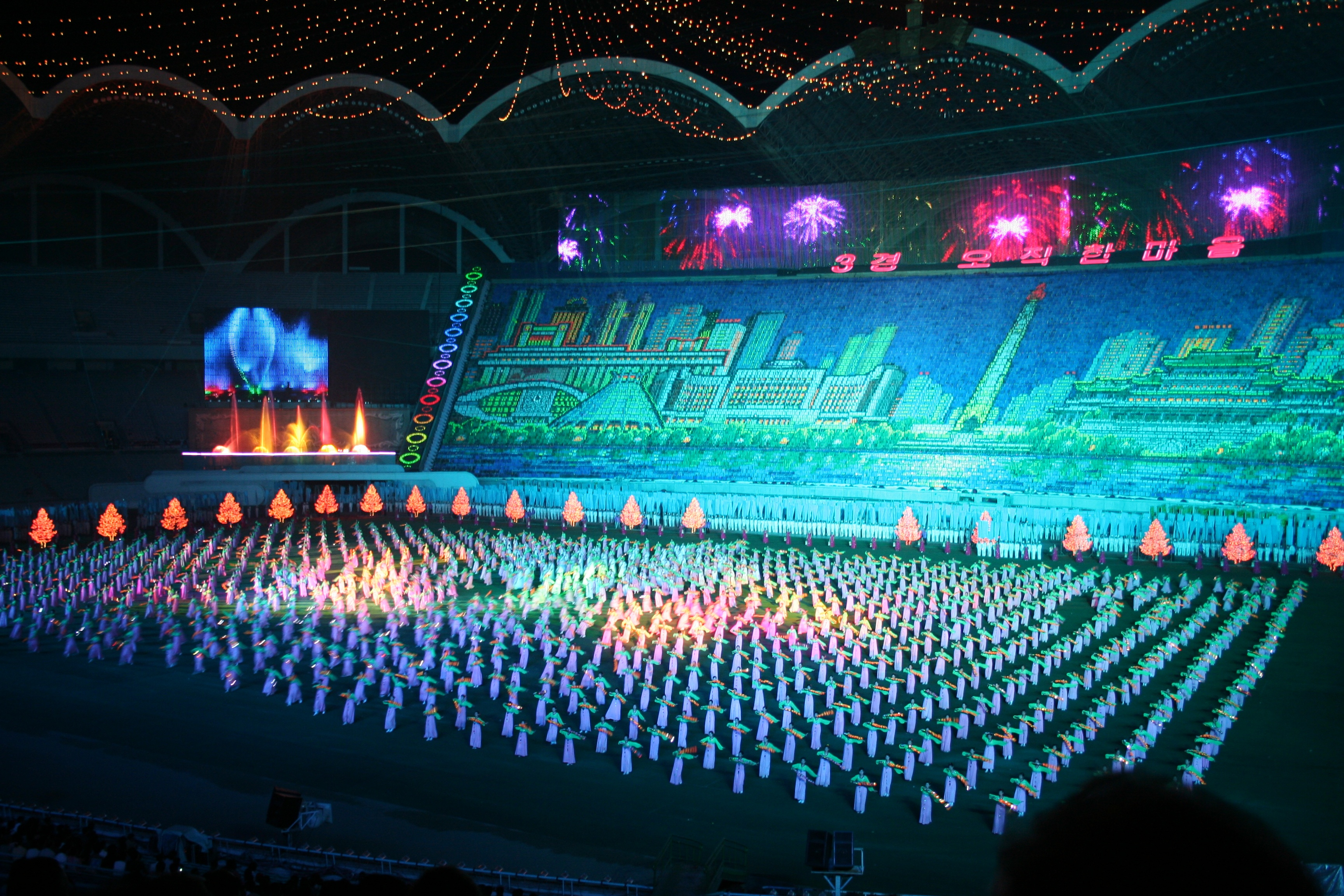 'Pyongyang', World's capital